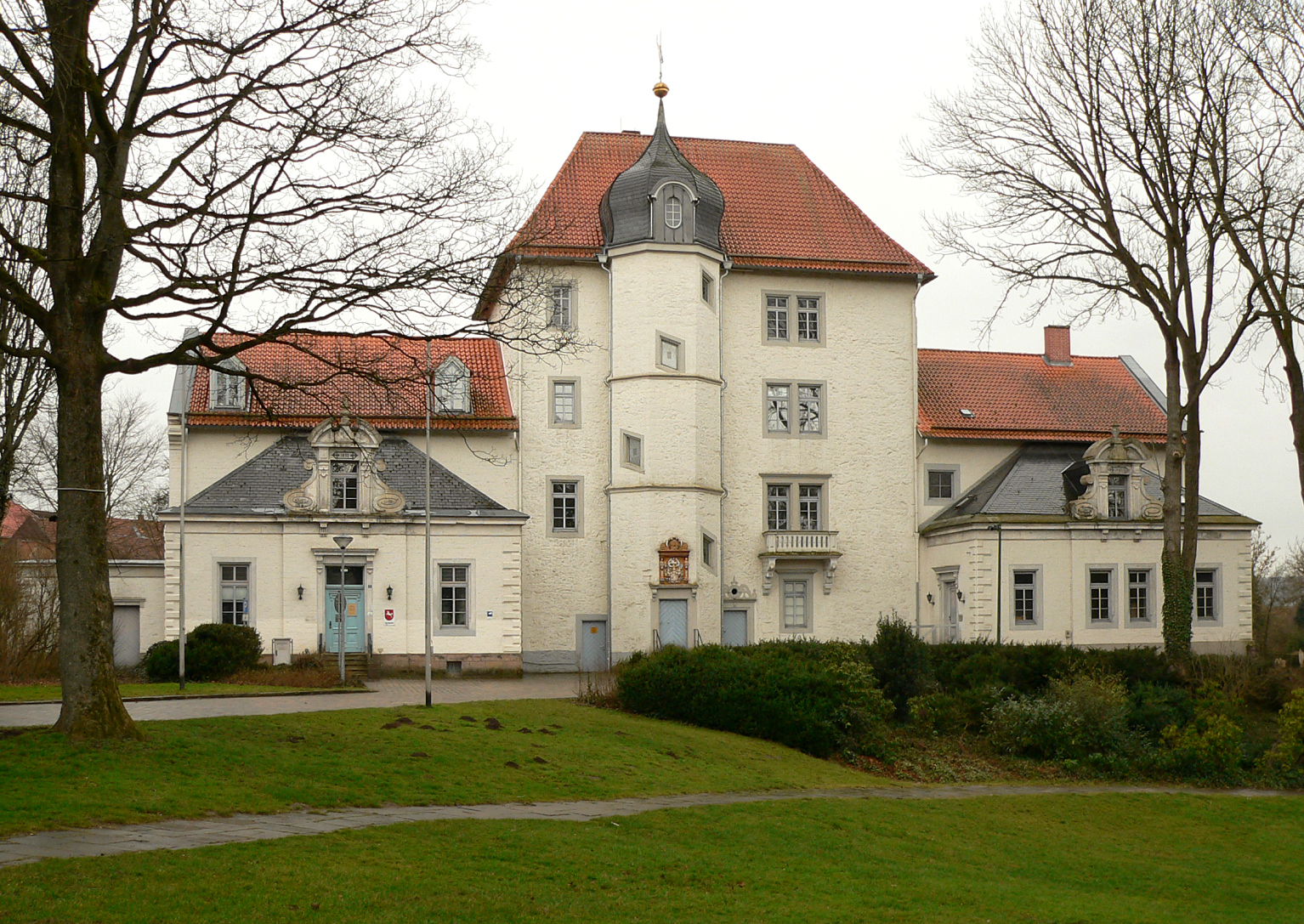 Burg Sehusa Vorderseite mit Treppenturm